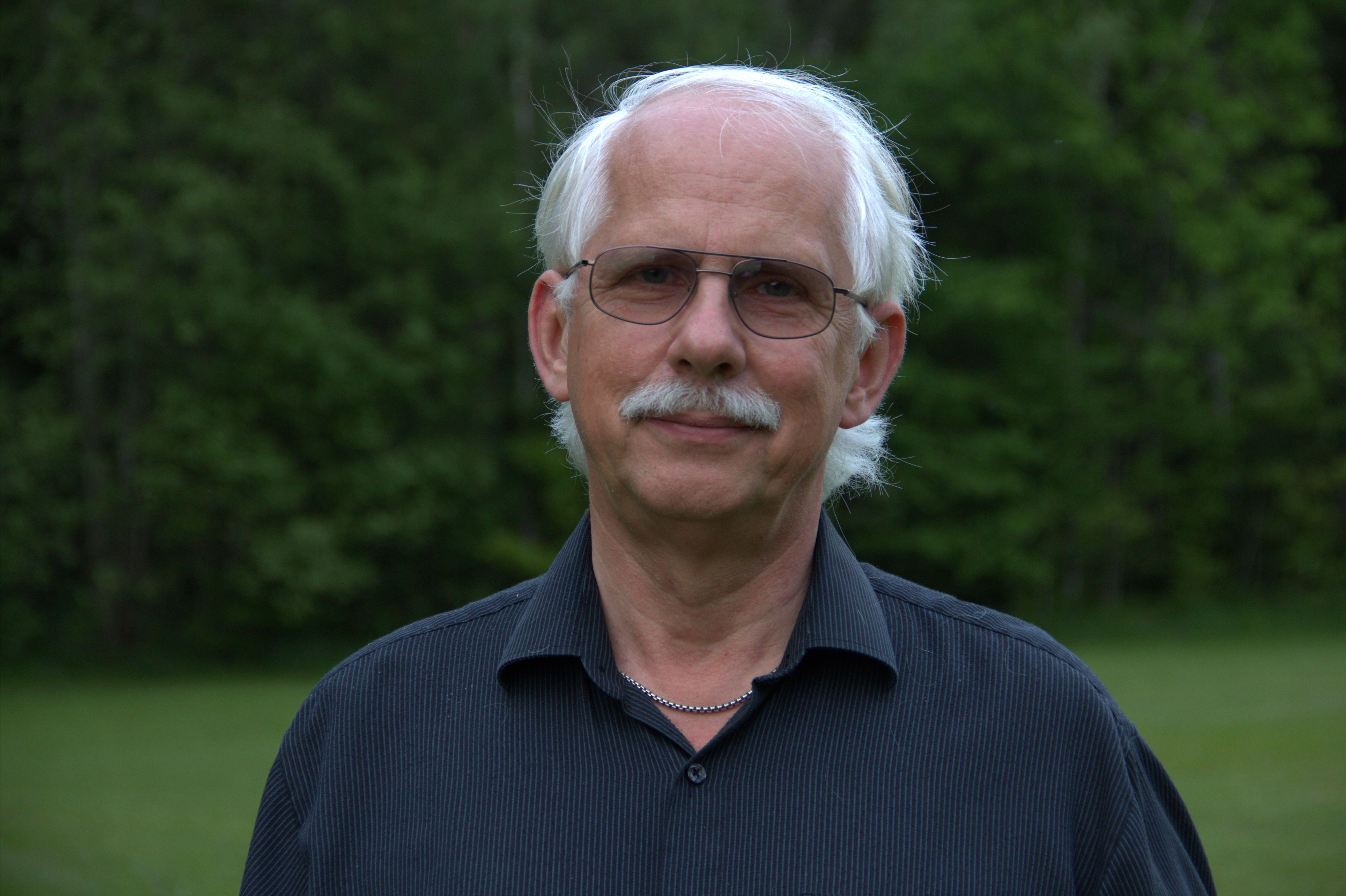 Författaren Gunnar Wall (f. 1951).